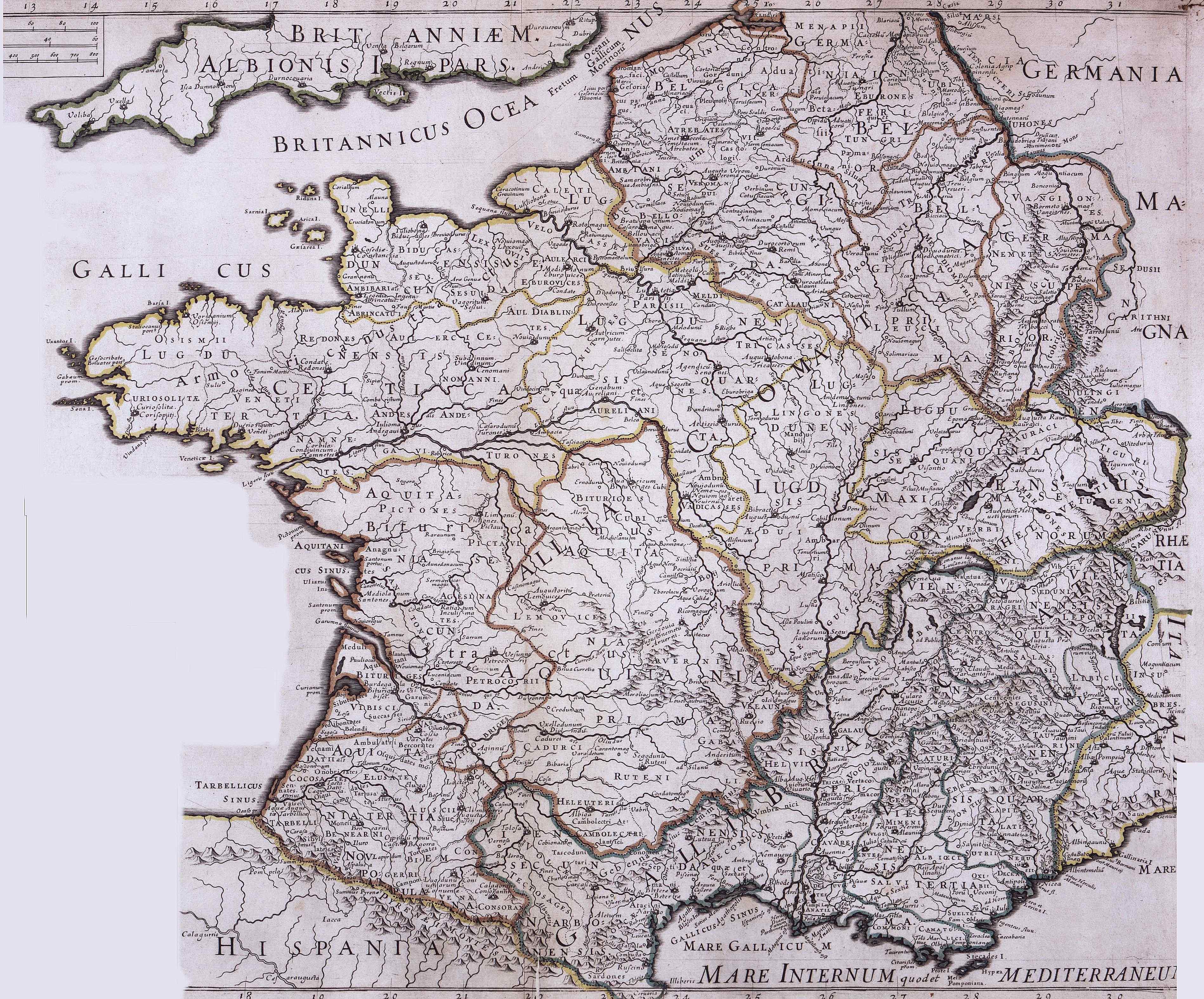 Carte de la Gaule antique du 18e siècle